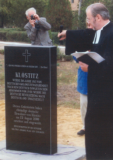 Einweihung Gedenkstein in Klöstitz